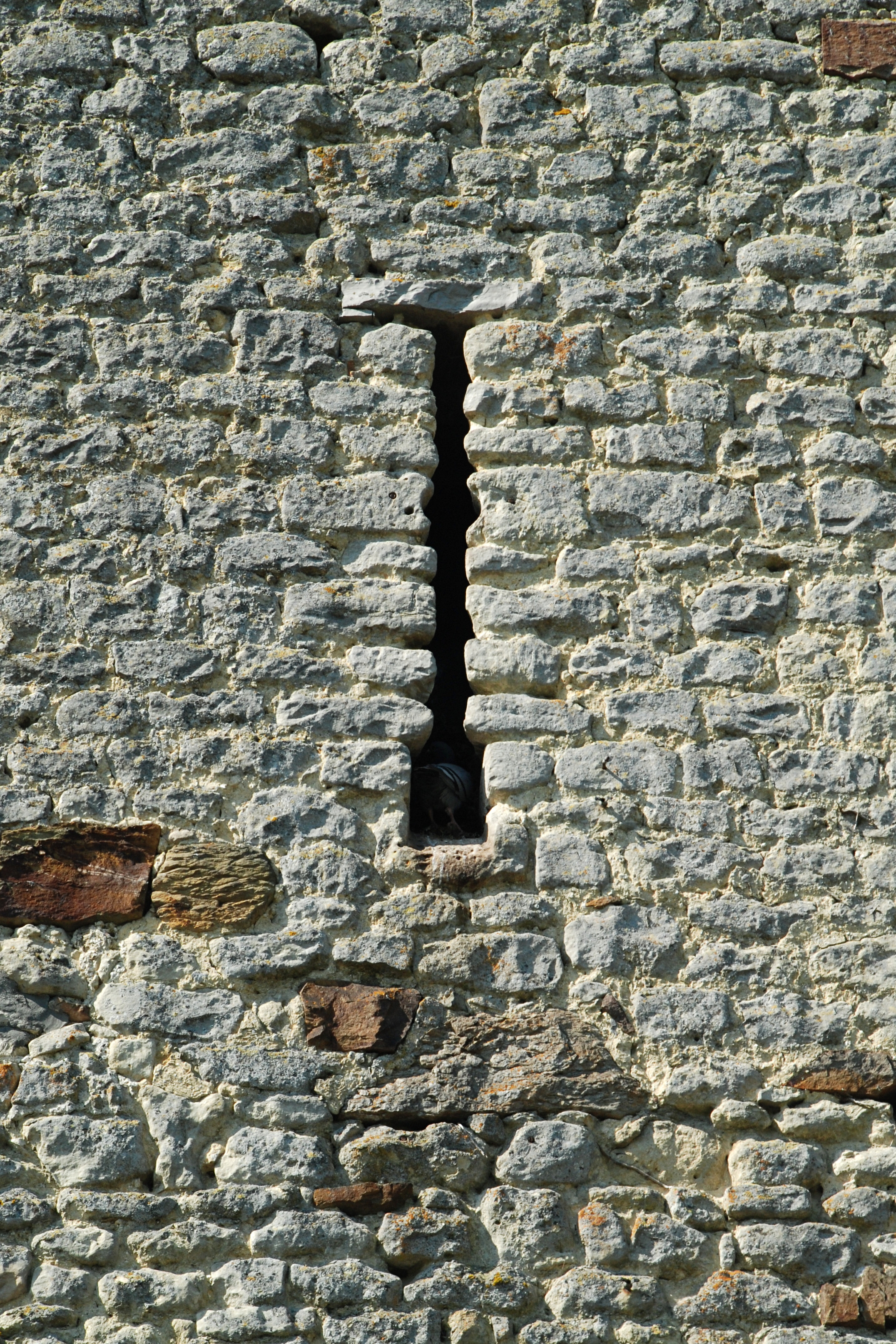 Belgique - Brabant wallon - Mont-Saint-Guibert - Corbais - Tour Griffon du Bois (donjon de Corbais, 13e siècle)